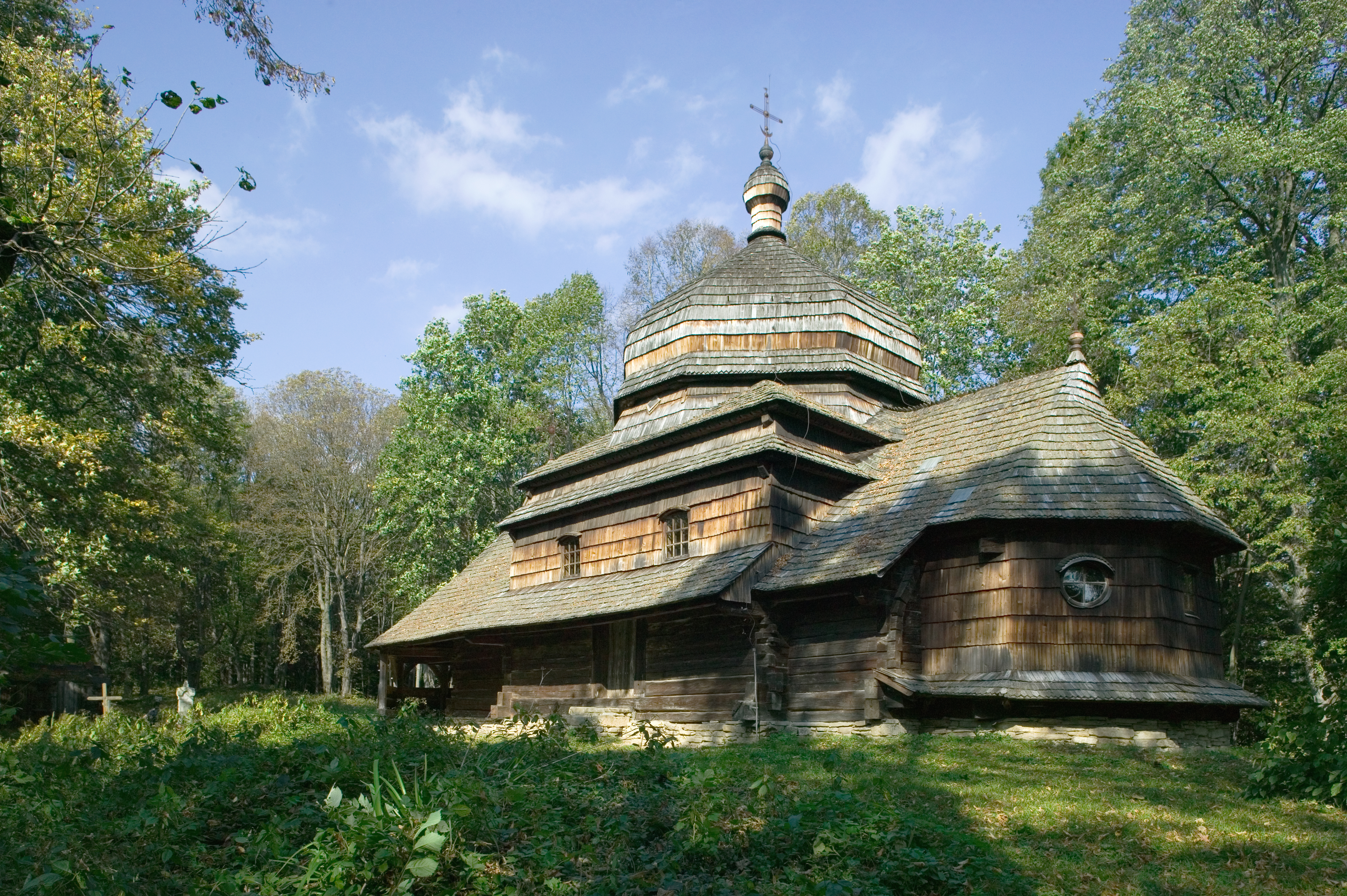 Ulucz, greckokatolicka cerkiew Wniebowstąpienia Pańskiego